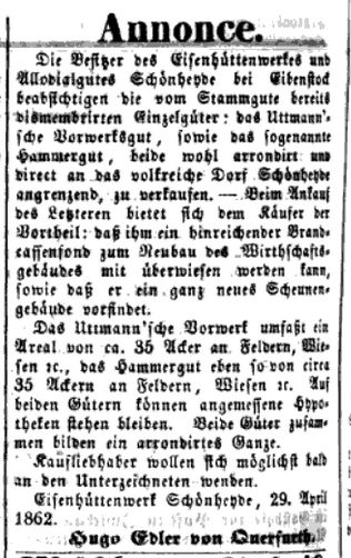 In einer Anzeige in der Leipziger Zeitung vom 6. Mai 1862 bot der Eigentümer des „Eisenhüttenwerk Schönheyde“, Hugo Edler von Querfurth, neben dem Hammergut auch das Uttmannsche Vorwerk zum Kauf an. Es habe ein Areal von circa 35 Acker an Feldern, Wiesen etc. Nach den damaligen Flächenmaßen in Sachsen entsprach ein Acker ungefähr 5534,232 m², das Vorwerk hatte also eine Fläche von gut 19 Hektar. (Link zu Zweite Beilage zu Nr. 106 vom 6. Mai 1862 der Leipziger Zeitung)„vom Stammgute bereits dismembrite Einzelgüter“? Dies bedeutet, dass die Flächen vom eigentlichen Eisenwerk abgetrennt wurden, wohl in dem Sinn einer rechtlichen Verselbständigung. Diese Erläuterung findet sich in Meyers Großem Konversations-Lexikon von 1905, hier.